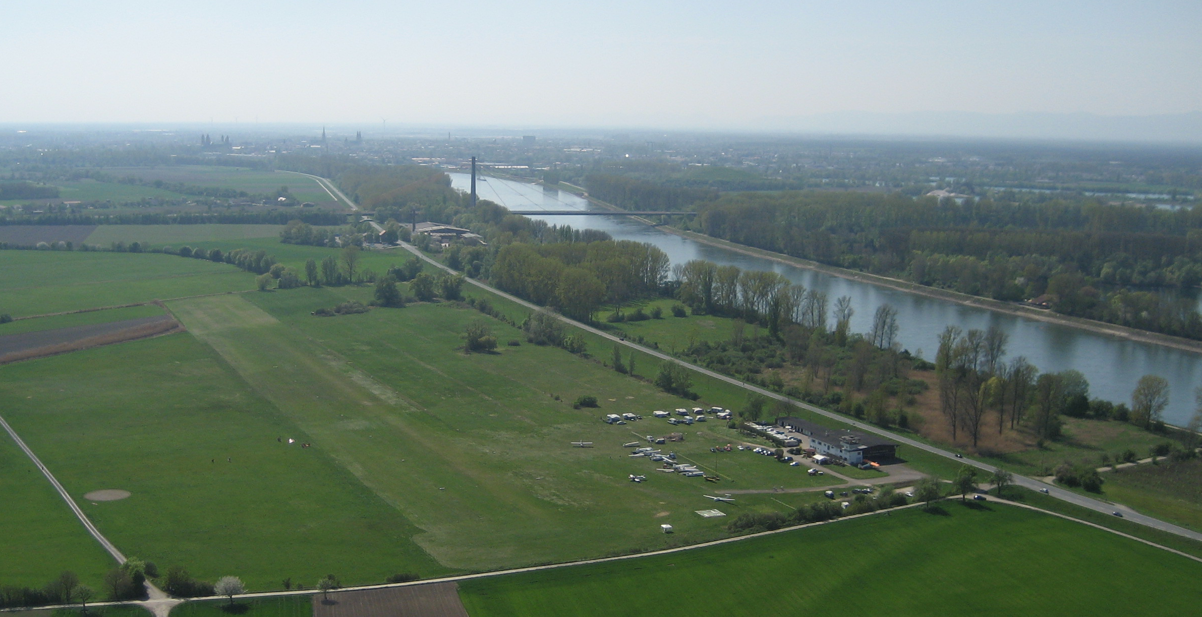 Airfield Herrenteich (Germany)